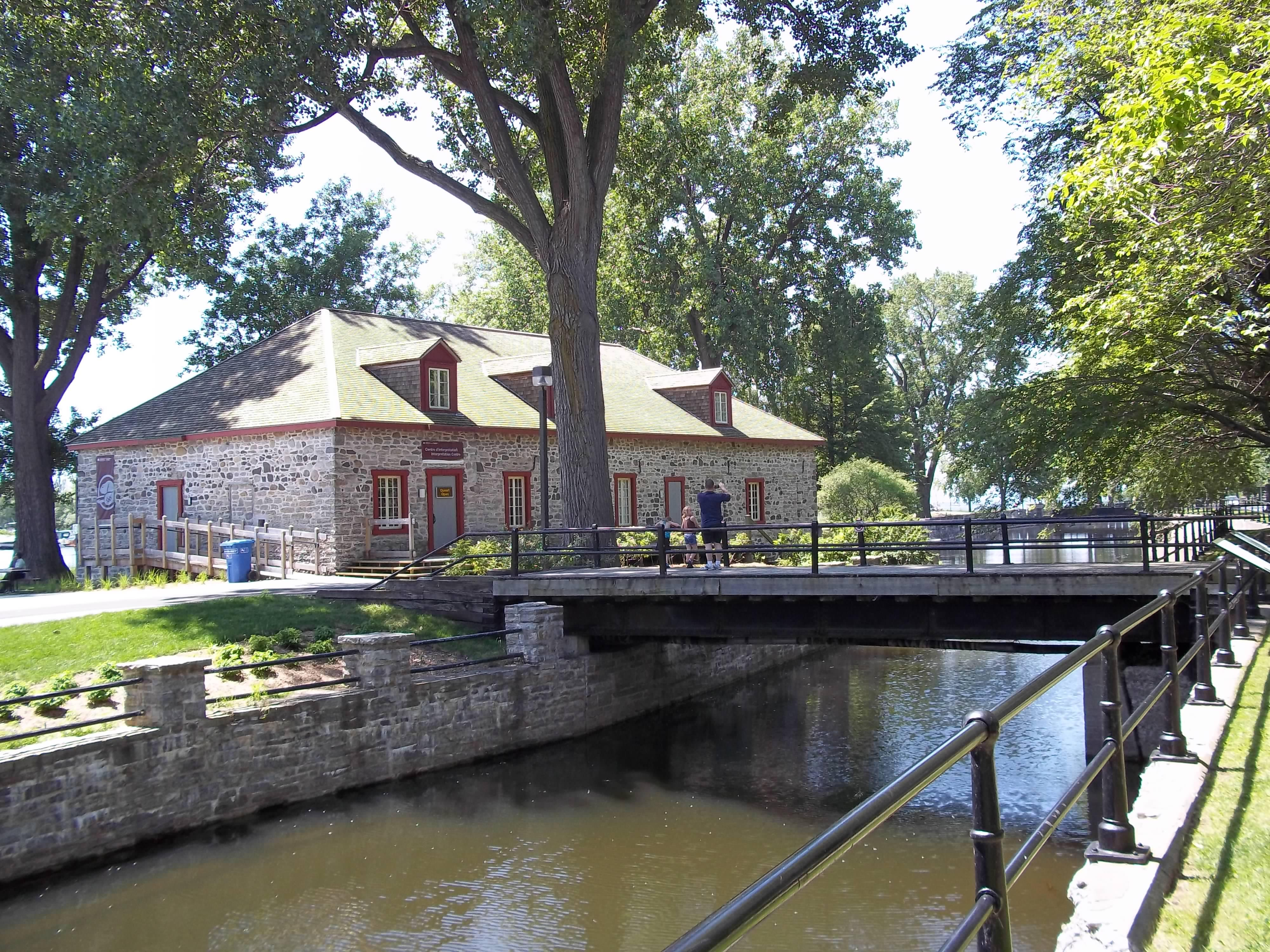 Entrepôt abritant le centre d'interprétation du commerce de la fourrure à Lachine, Montréal